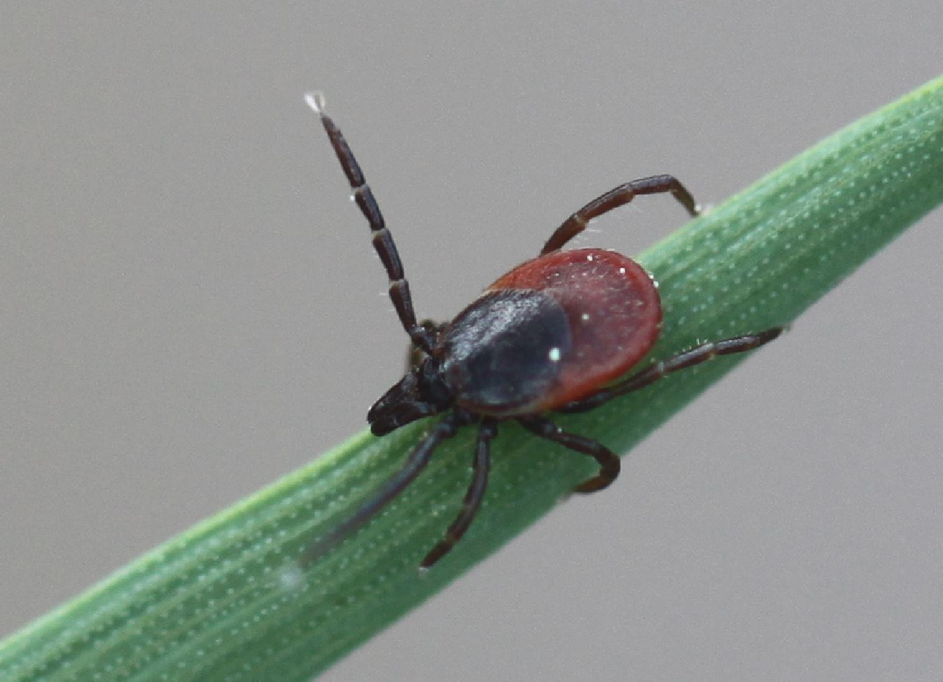 Gemeiner Holzbock (Ixodes ricinus) am 3. Mai 2020 in der Schwetzinger Hardt